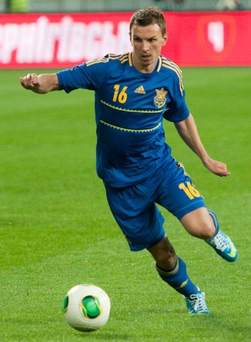 Олександр Ковпак у дебютному для себе матчі за збірну України у грі з Камеруном